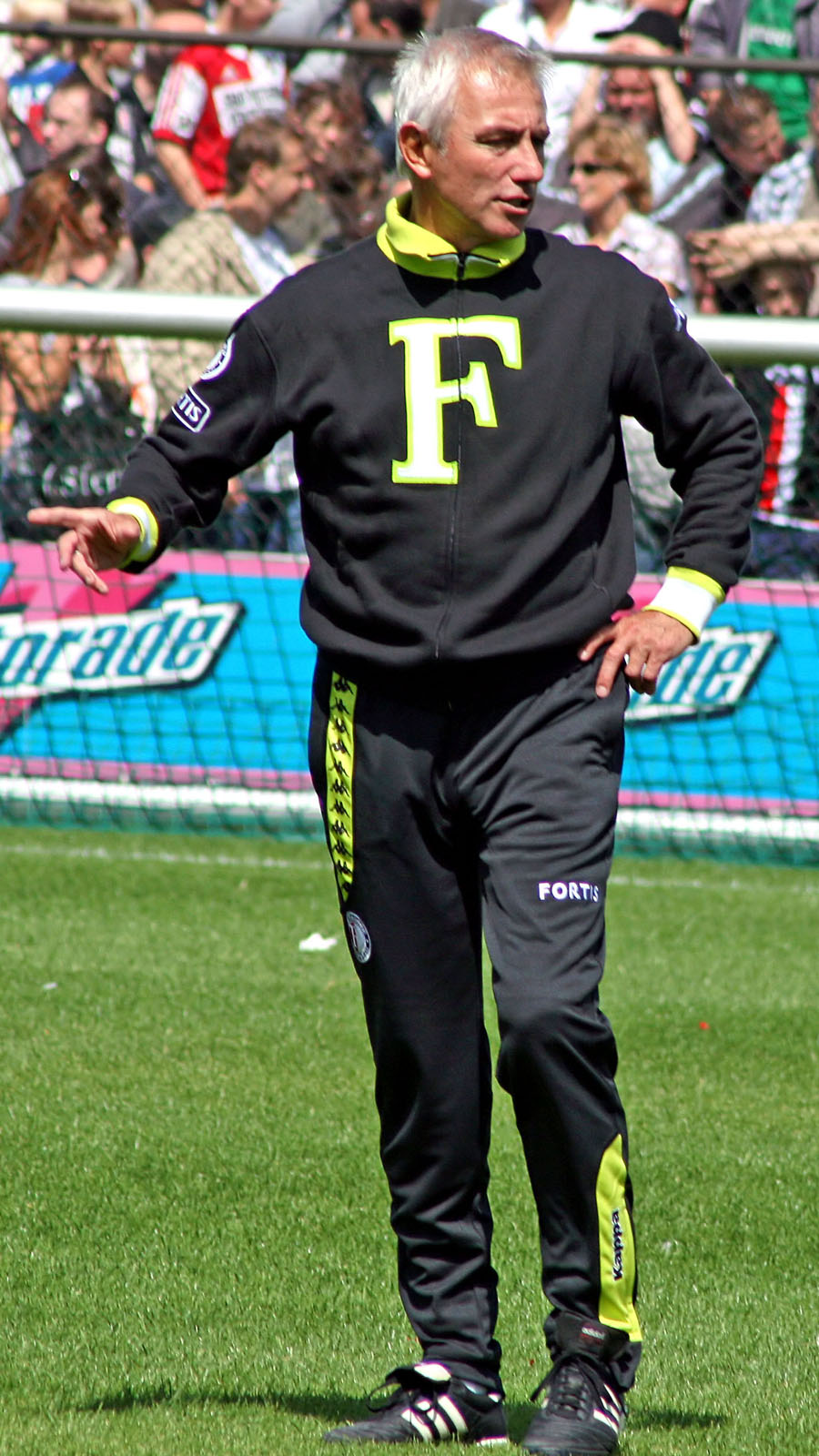 Bert van Marwijk (Feyenoord)